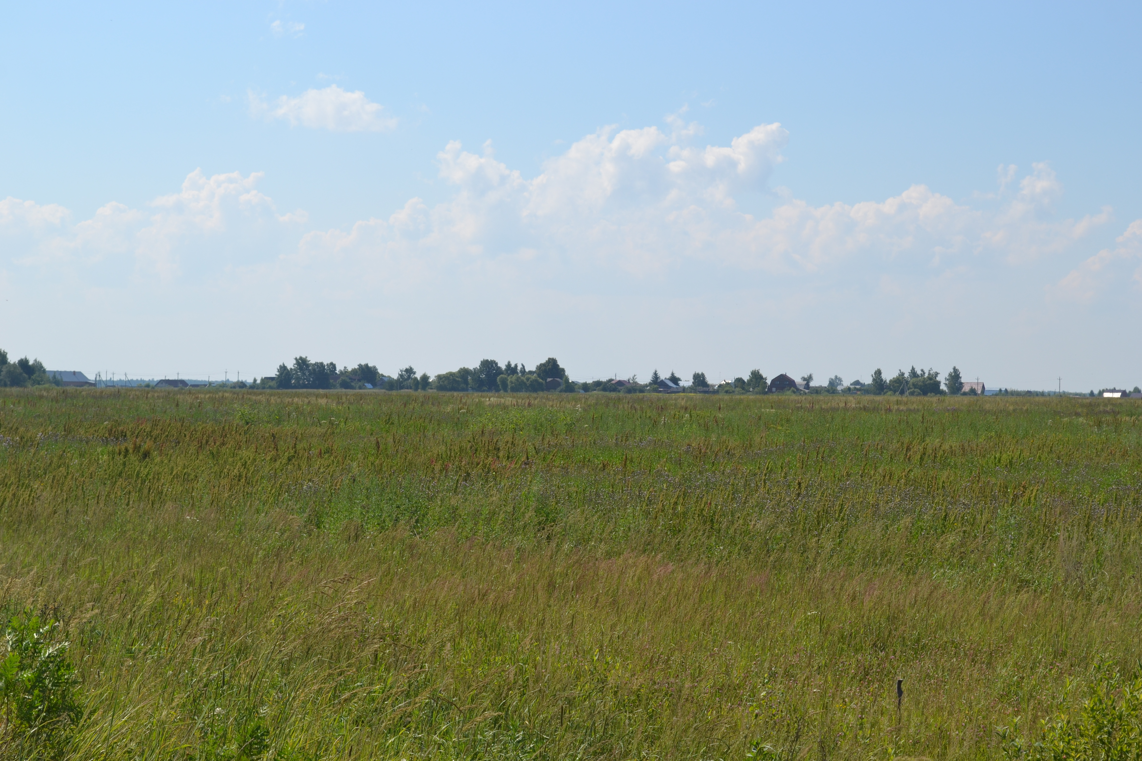 Поле возле деревни Погостище (Шатурский район)